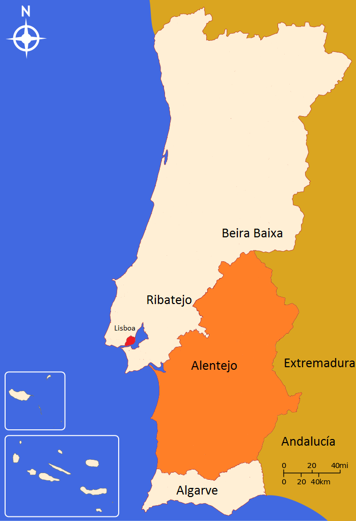 Mapa do Alentejo em Portugal (Ponte de Sôr em laranja claro)